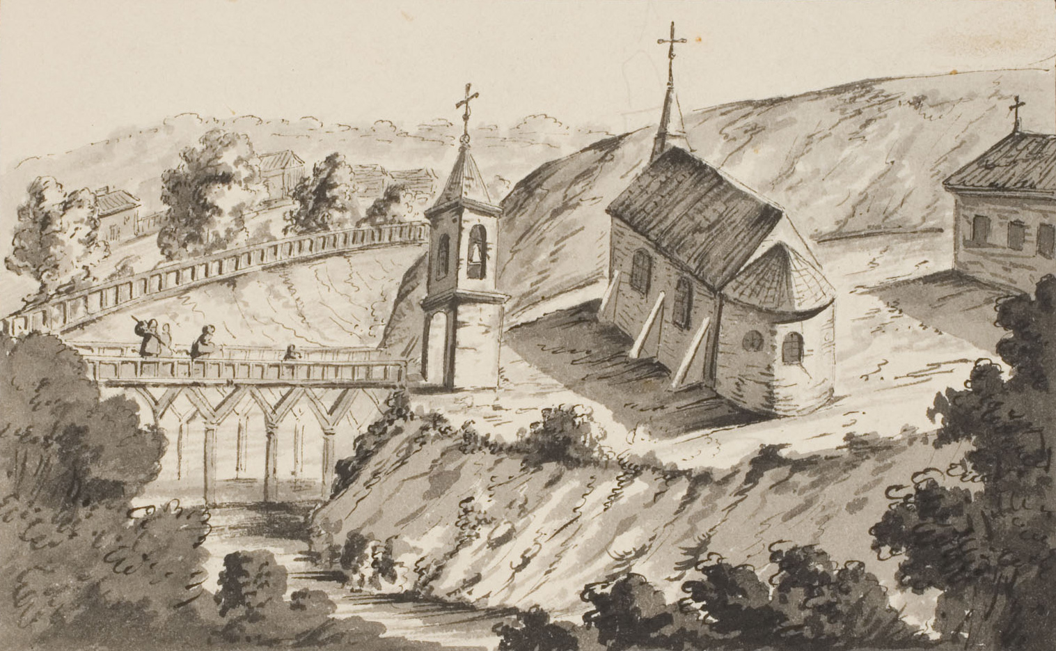 Беларуская (тарашкевіца): Лагойск (Łahojsk), гара Замкавая (hara Zamkavaja). Царква Яўленьня Гасподняга і манастыр базылянаў